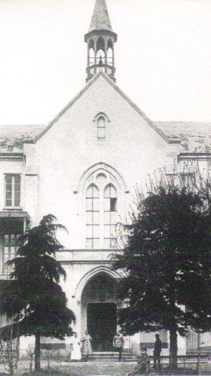 Maison des petites soeurs des pauvres au Mans